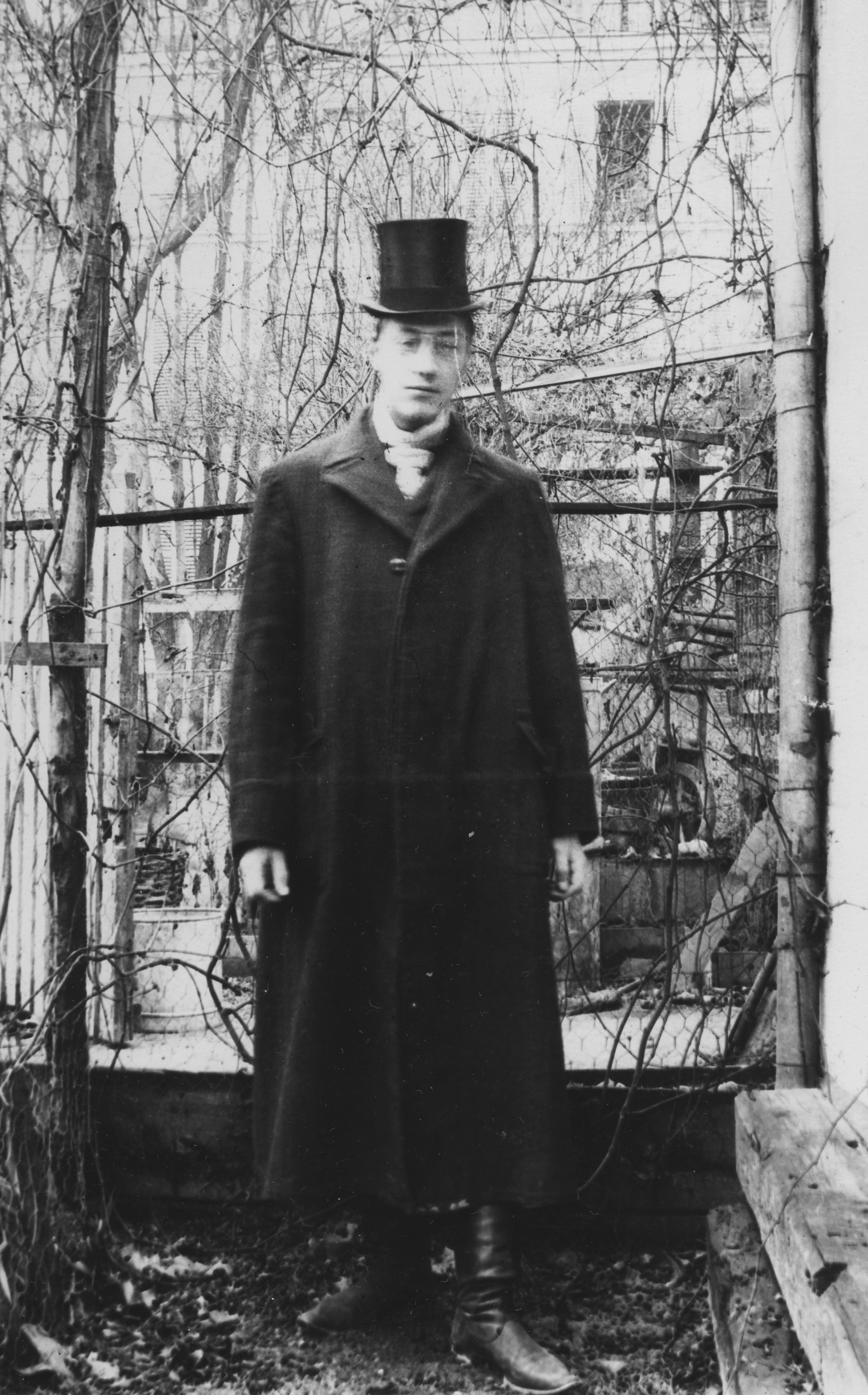 Гумилёв, Николай Степанович. Париж 1906 г. Скан с негатива Максимилиана Волошина